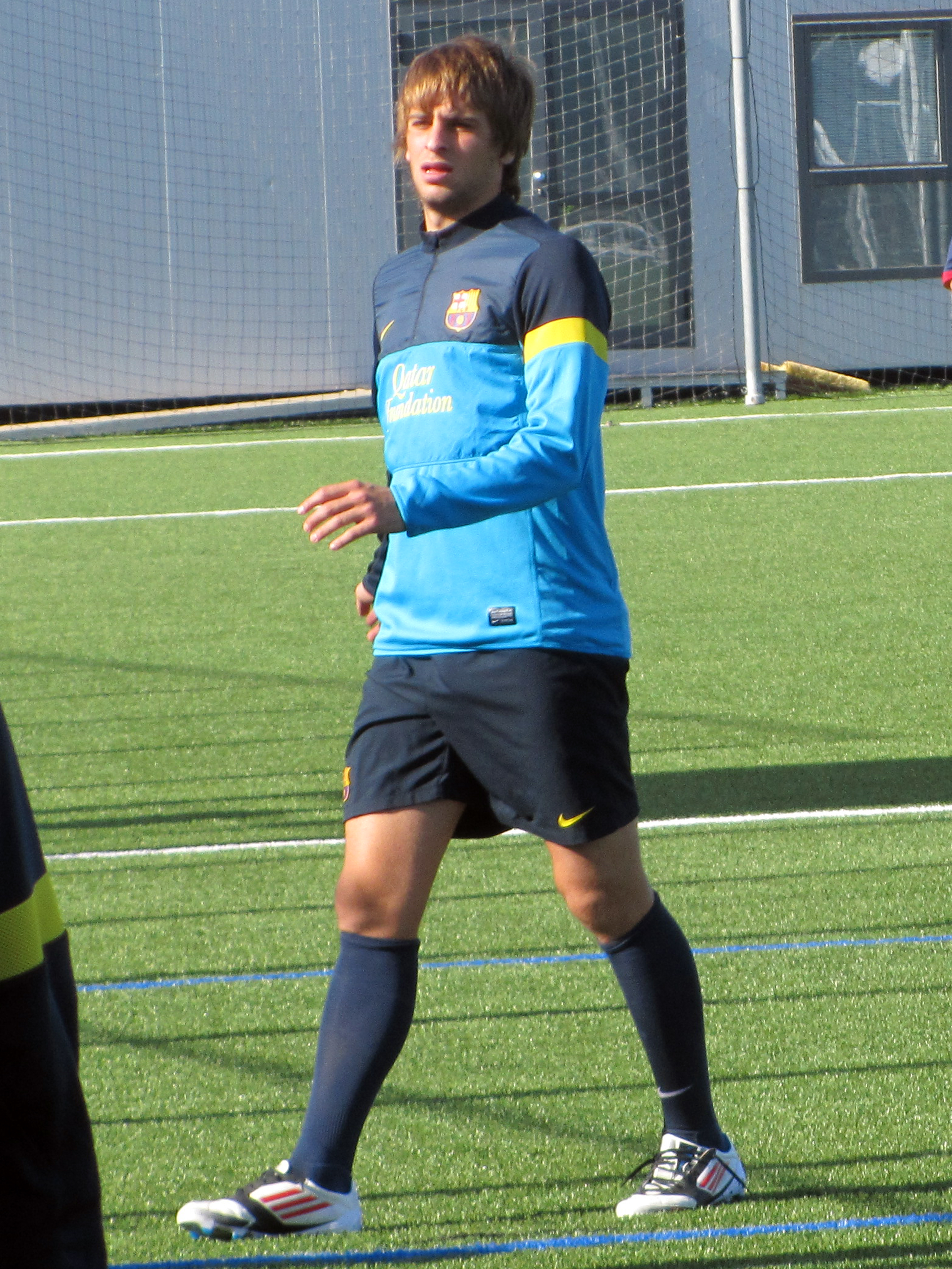 Foto realizada por Javier Segura (@castroquini en Twitter)